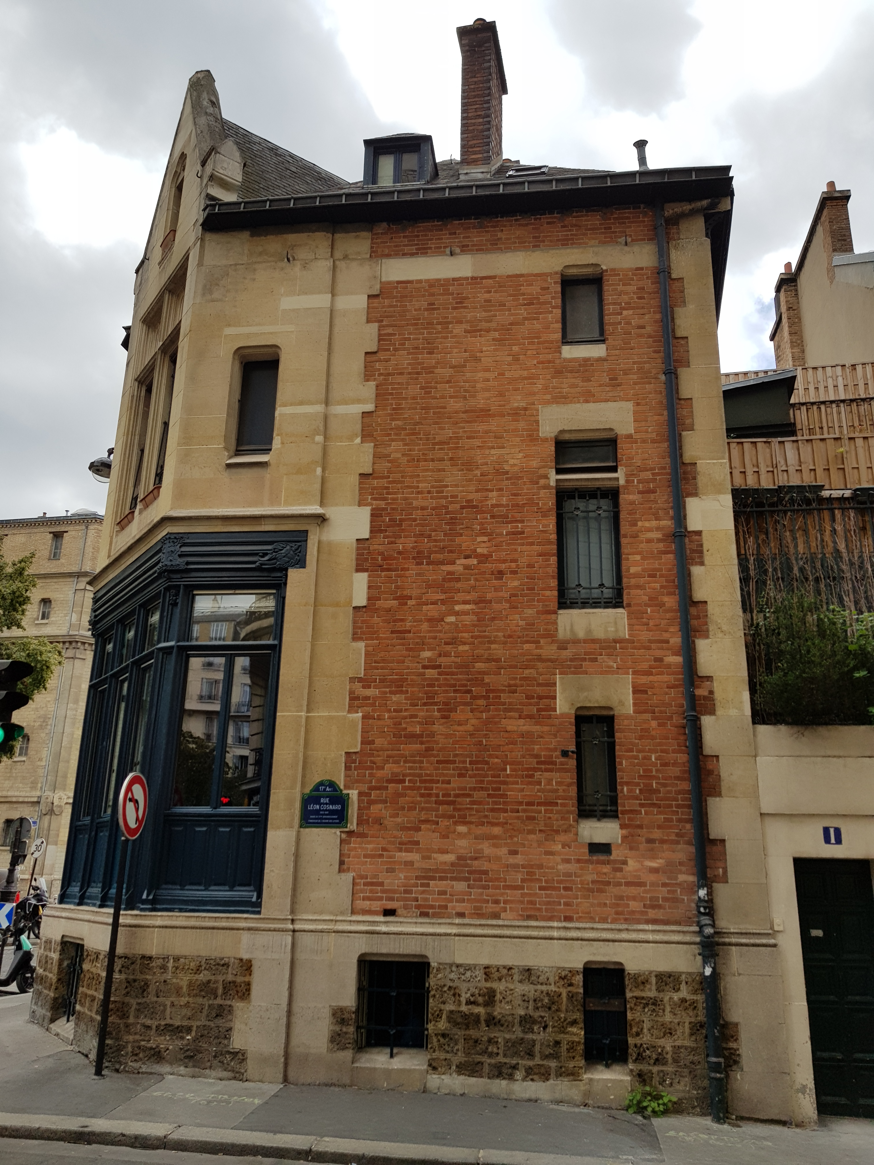 1, rue Léon-Cosnard, Paris 17e.